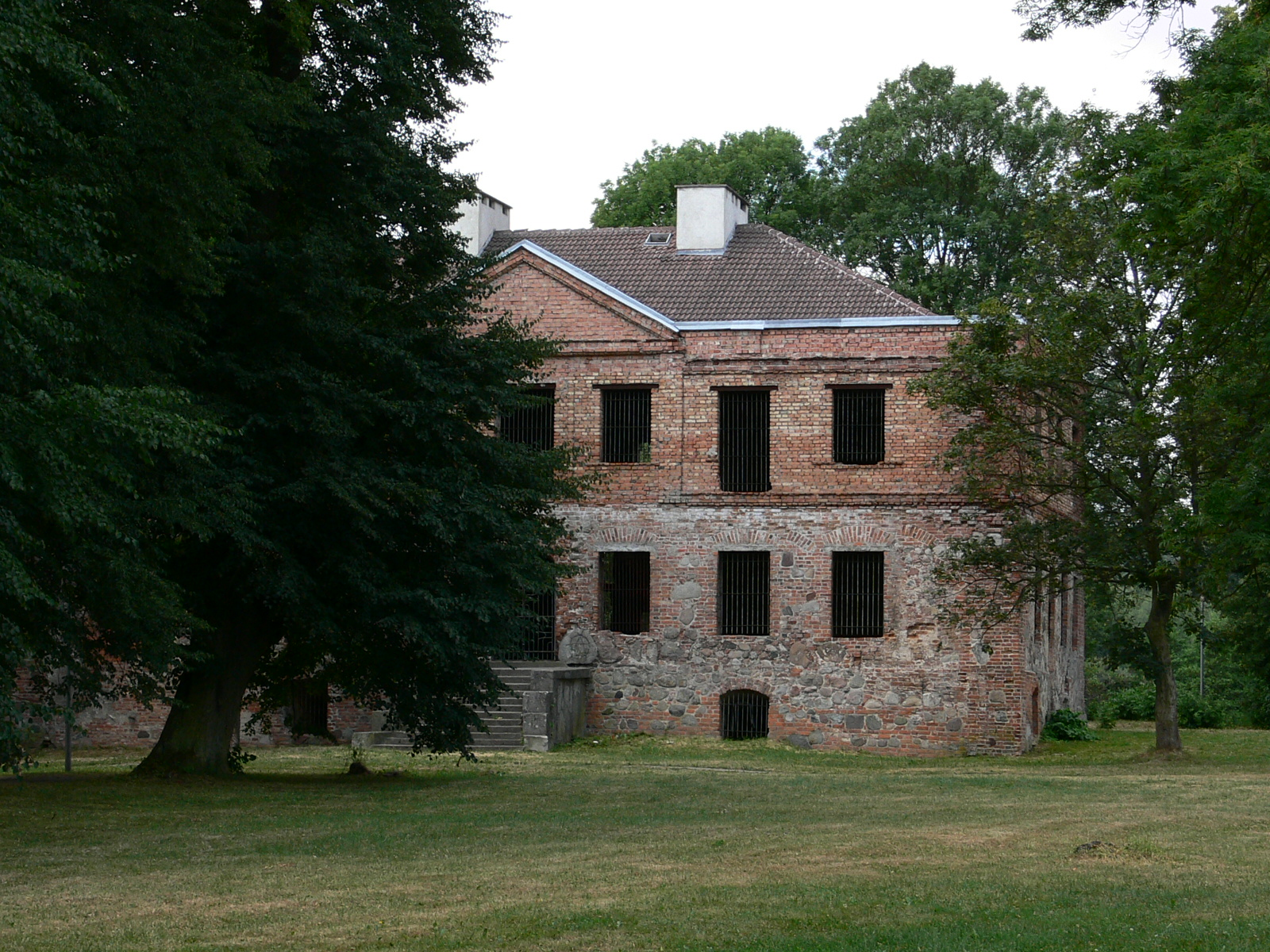 Kalisz Pomorski - Zamek Wedlów